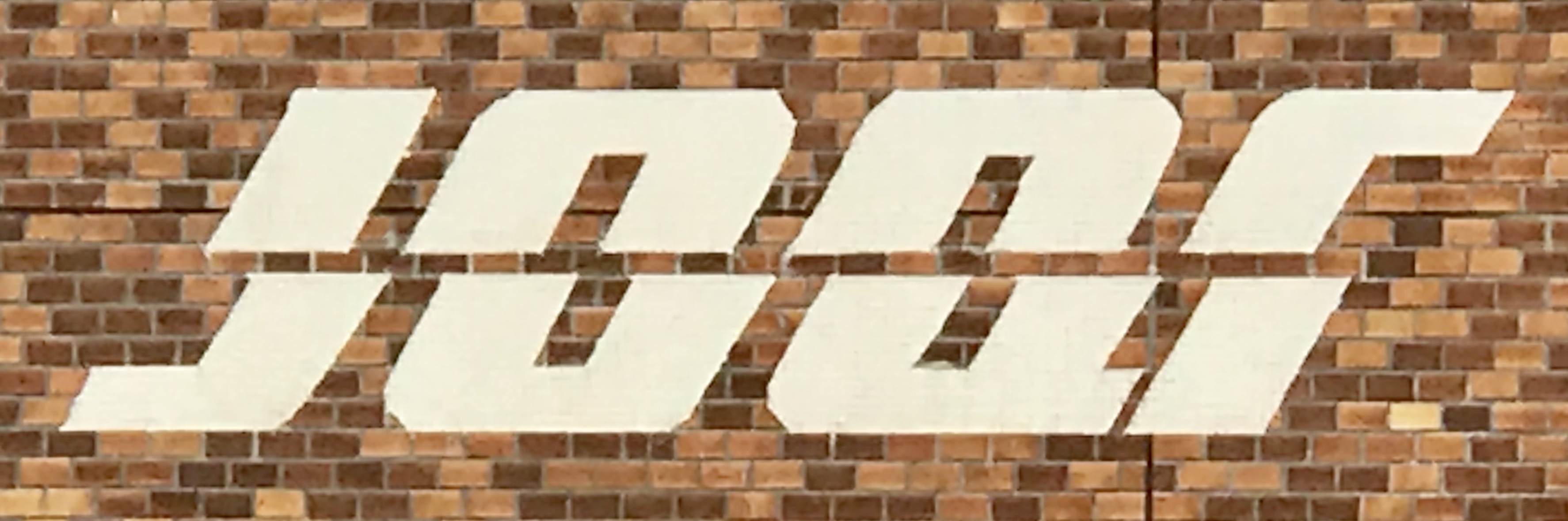 川口送信所壁面に残る1984年〜2006年まで使われていた旧々ロゴ